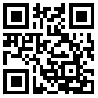 QR kodas vikipedijos tinklalapio URL